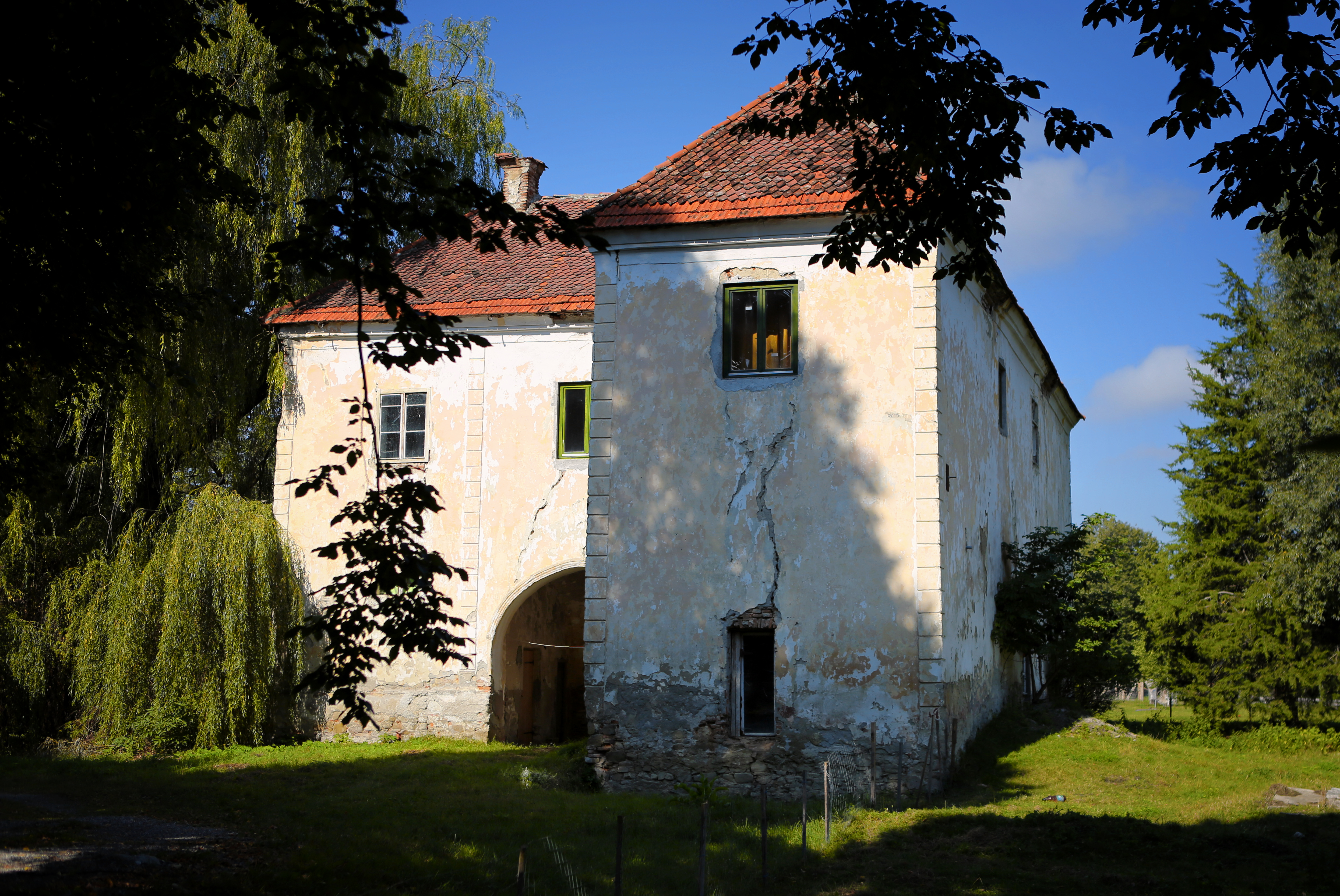 Castelul Mikes 01